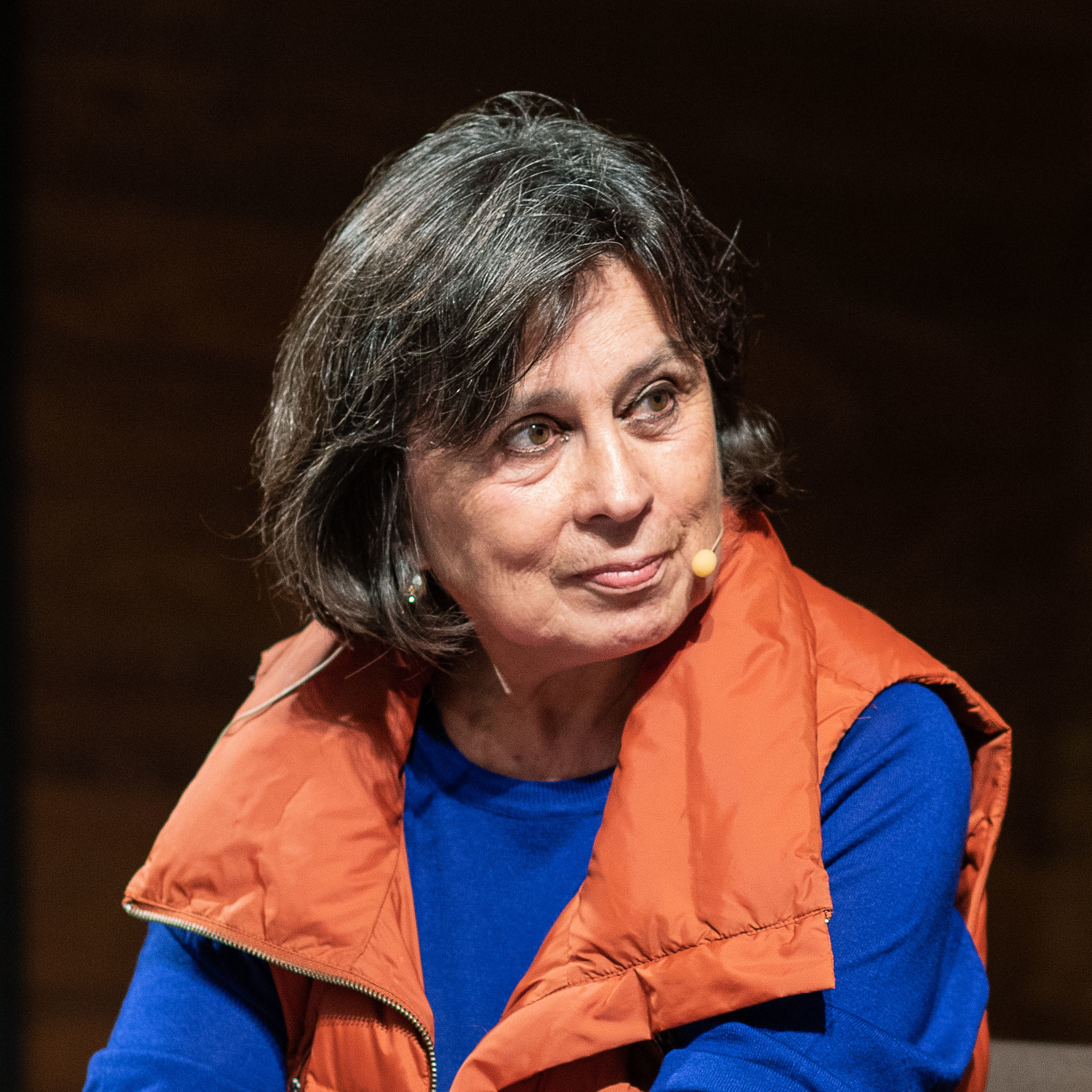 Literaktum 2018